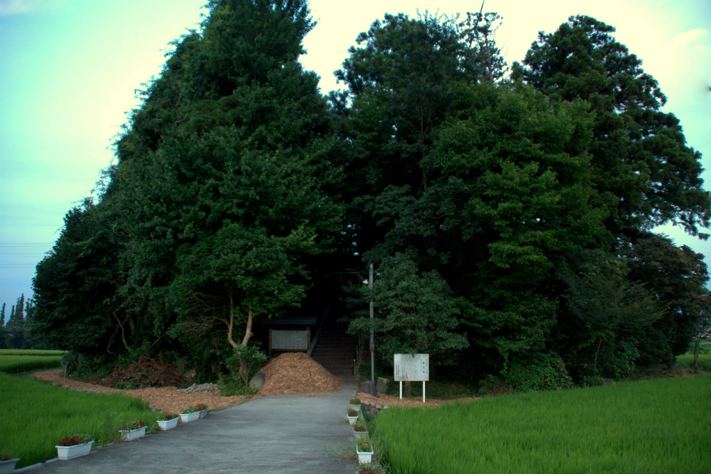 富山県に存在する、稚児塚です。撮影者：Series207 Chigozuka, Tateyama, Toyama, Japan